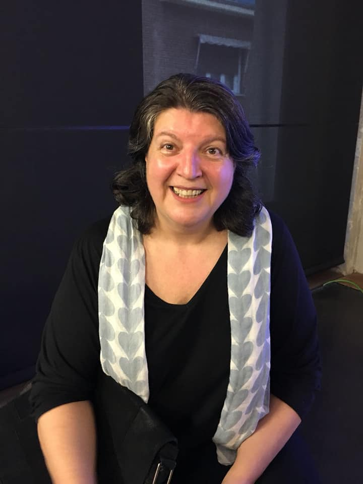 Pilar Vicente Foronda en Medialab-Prado